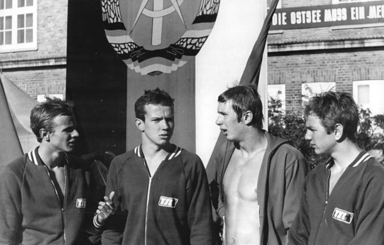 Wilfried Hartung, Hartmut Flöckner, Lothar Gericke, Werner Hinz ADN-ZB Mittelstädt 10-7-71-Rostock: XXIV.DDR-Meisterschaften im Sportschwimmen (2.Tag) - In der 4x100 m Freistilstaffel der Herren erkämpfte sich der TSC Berlin mit (v.l.) Wilfried Hartung, Hartmut Flöckner, Lothar Gericke und Werner Hinz in 3:42,6 min (DDR-Rekord für Klubstaffeln eingestellt) den Meistertitel.